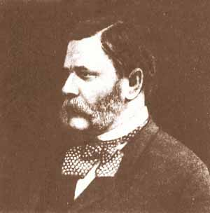 Абаза А. А. (1821-1895), российский государственный деятель